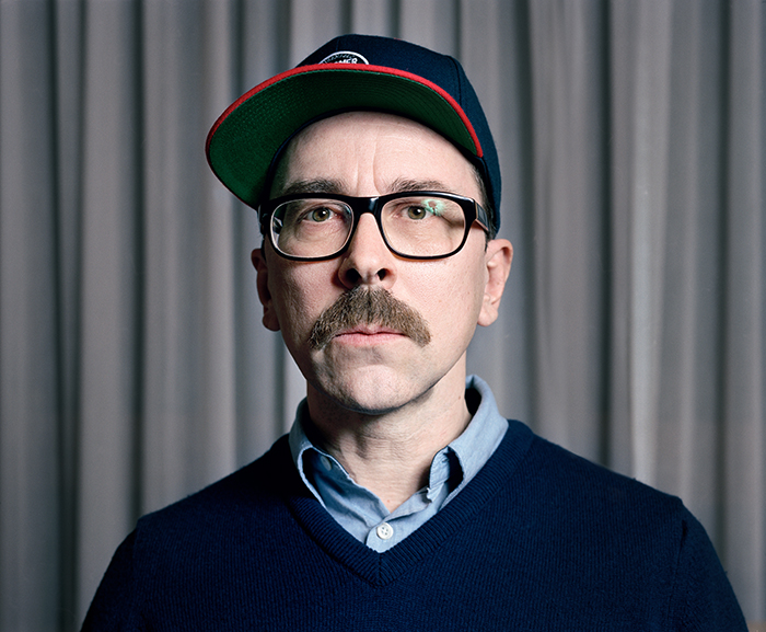 Dies ist ein Portrait, welches von Patrick Pollmeier erstellt wurde. Auf gibt es weitere Versionen.